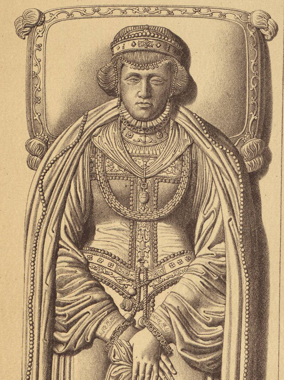 Según la obra Indumentaria española se trataría de D.ª Juana Enríquez, condesa de Osorno: Siglo XVI, Catedral de Burgos. Indumentaria española : documentos para su estudio, desde la época visigoda hasta nuestros dias (Lám. 1). Aparentemente se trataría, sin embargo, de la condesa de Castañeda: Aldonza Téllez (o Tello).